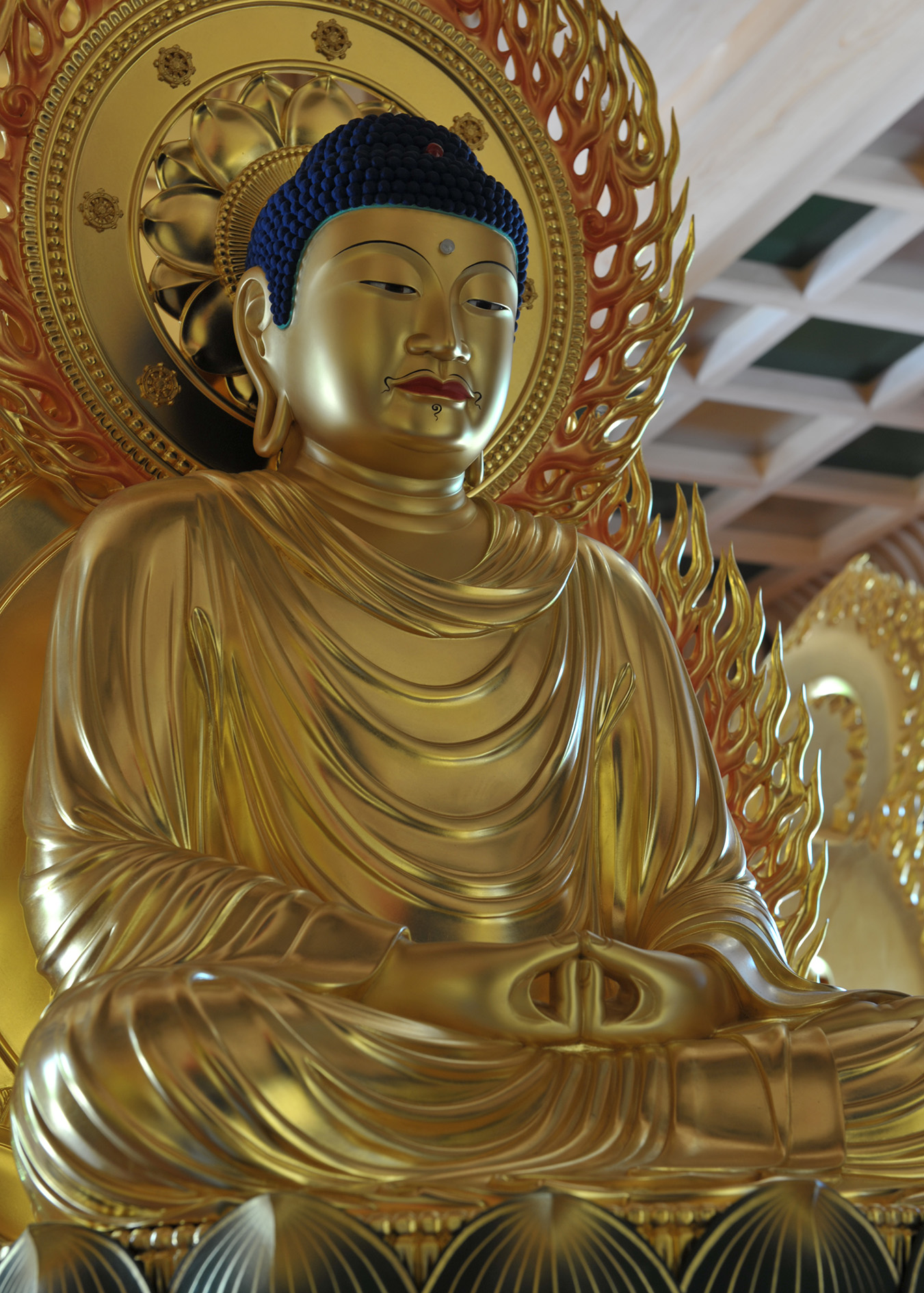 2018年5月12日に落成した蓮華院多宝塔に祀られる無量寿如来（五智如来の一体）。毎年1月13日・4月29日・6月13日にご開帳。